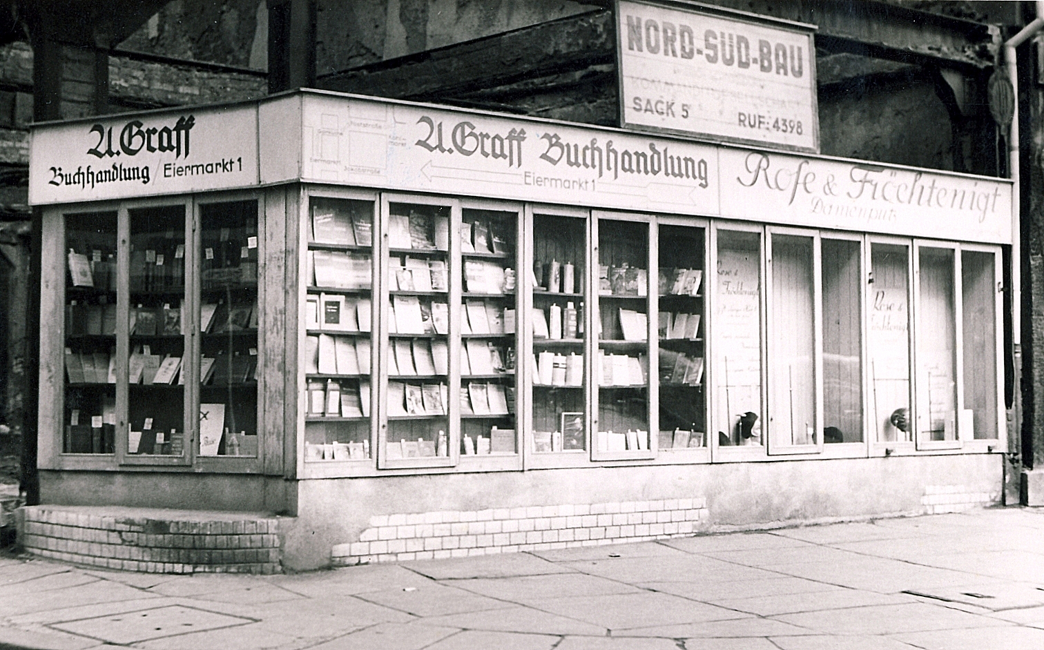 Braunschweig um 1950: Behelfsbau der Buchhandlung Graff mit Hinweis auf das Geschäft am Eiermarkt 1.